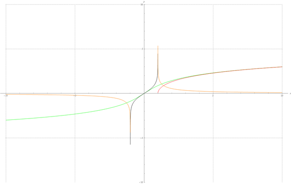 Հակադարձ հիպերբոլական ֆունկցիաներ